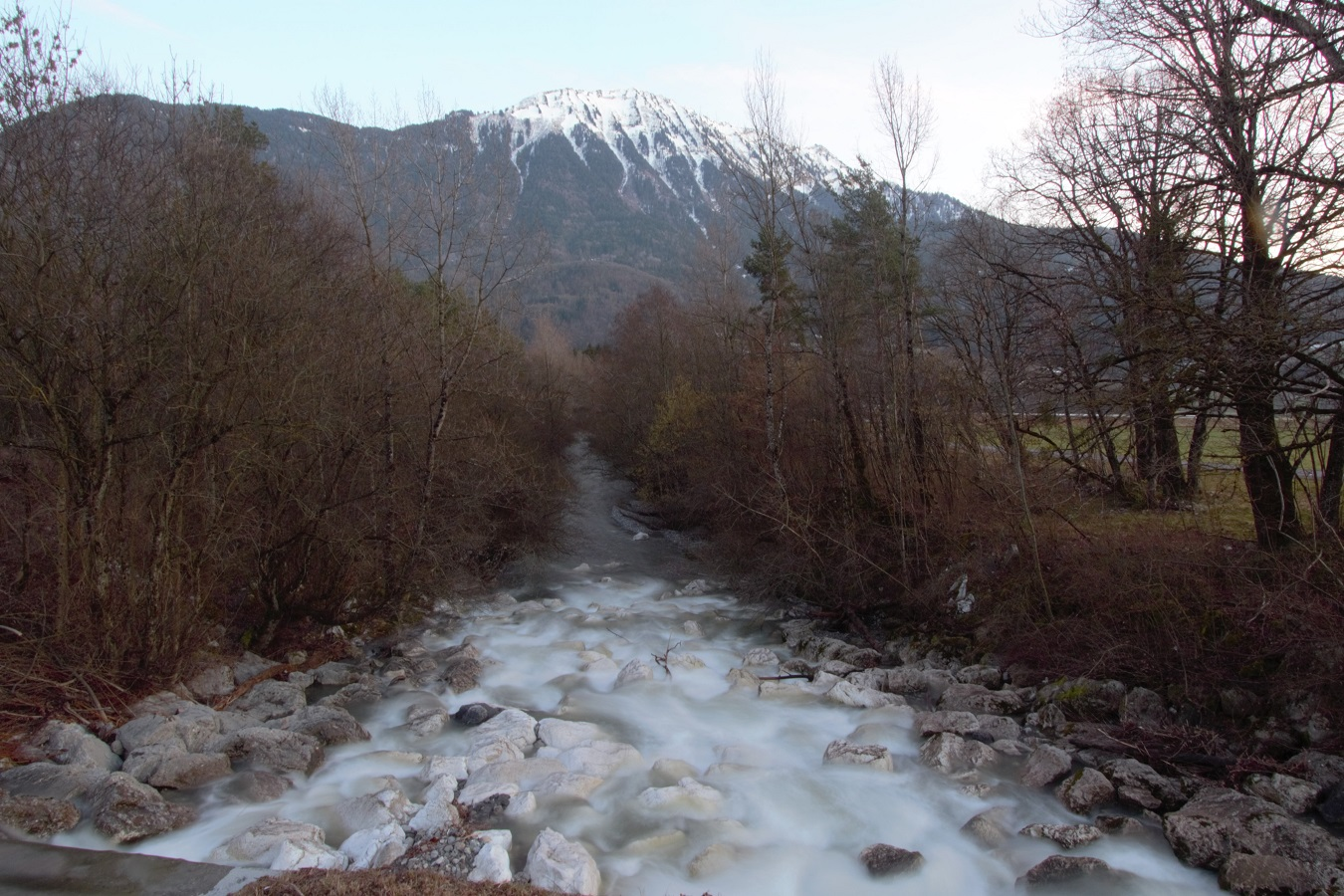 La Chaise au pont de la D1508 en regardant vers le sud.